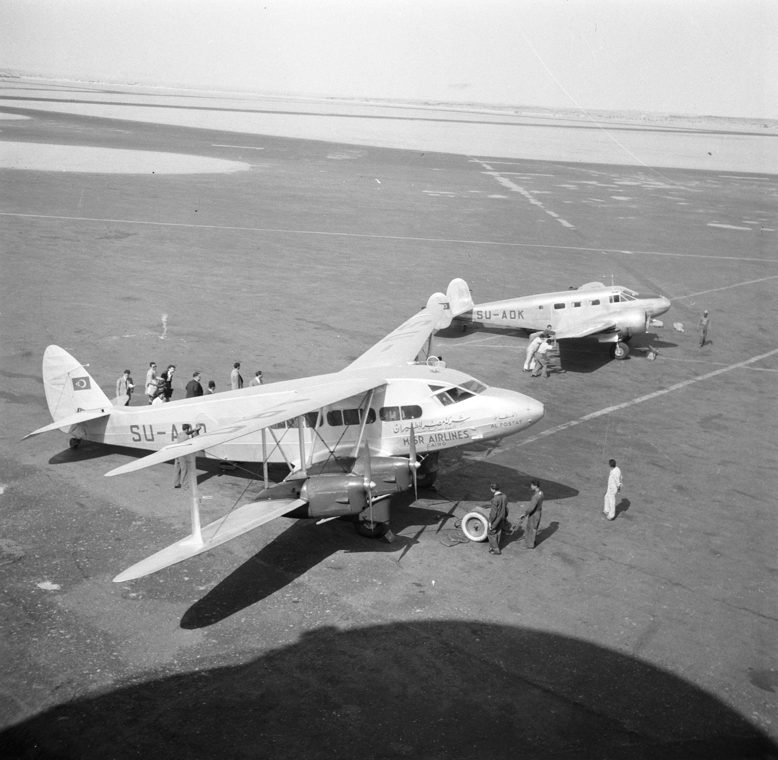 Twee vliegtuigen op het vliegveld van Cairo. Vliegtuigen behorend tot de vloot van Misr Airlines